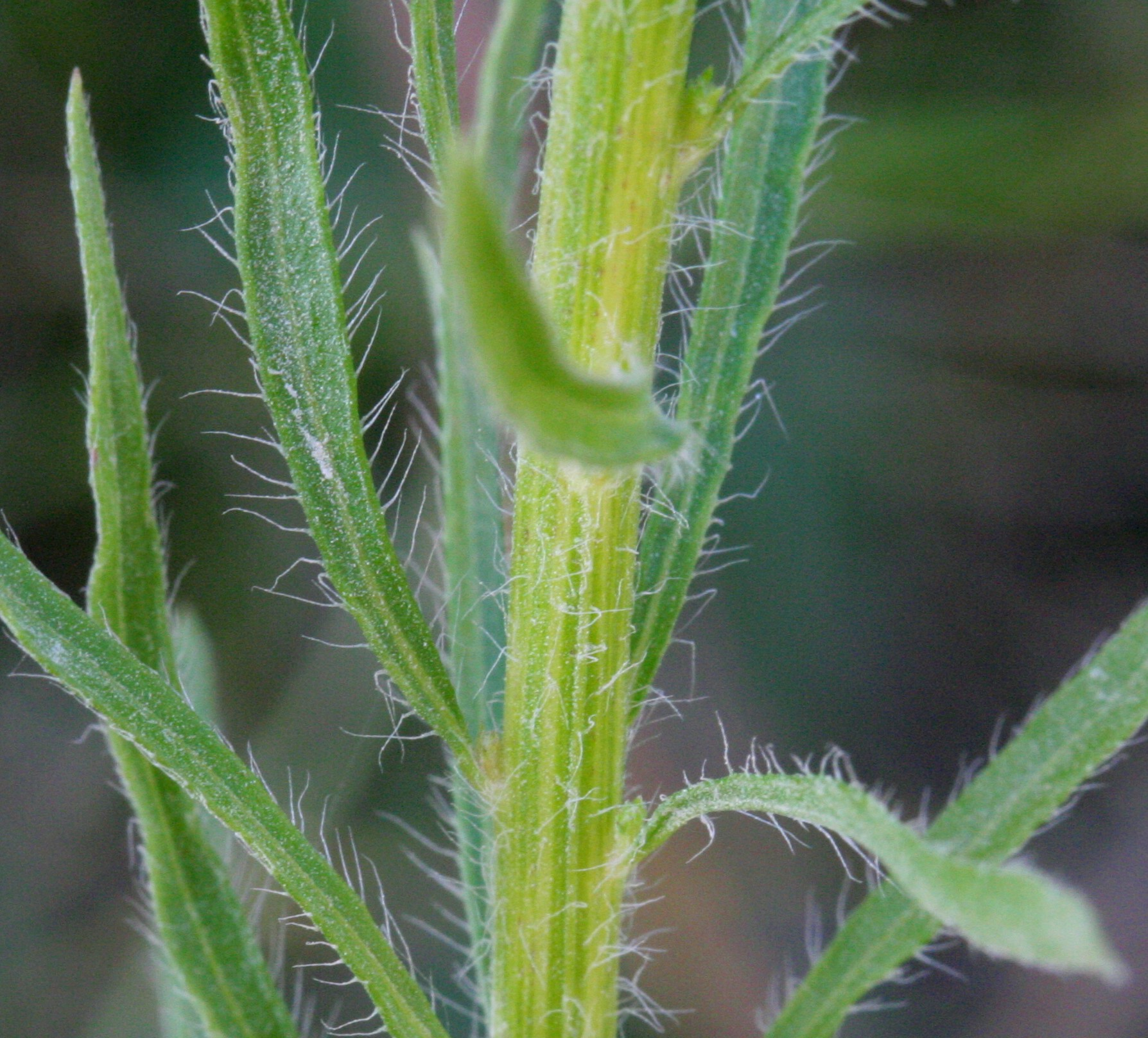 Conyza canadensis (Saeppola canadese)località Casteldardo, comune Trichiana, prov. Belluno, quota 389 m s.l.m.